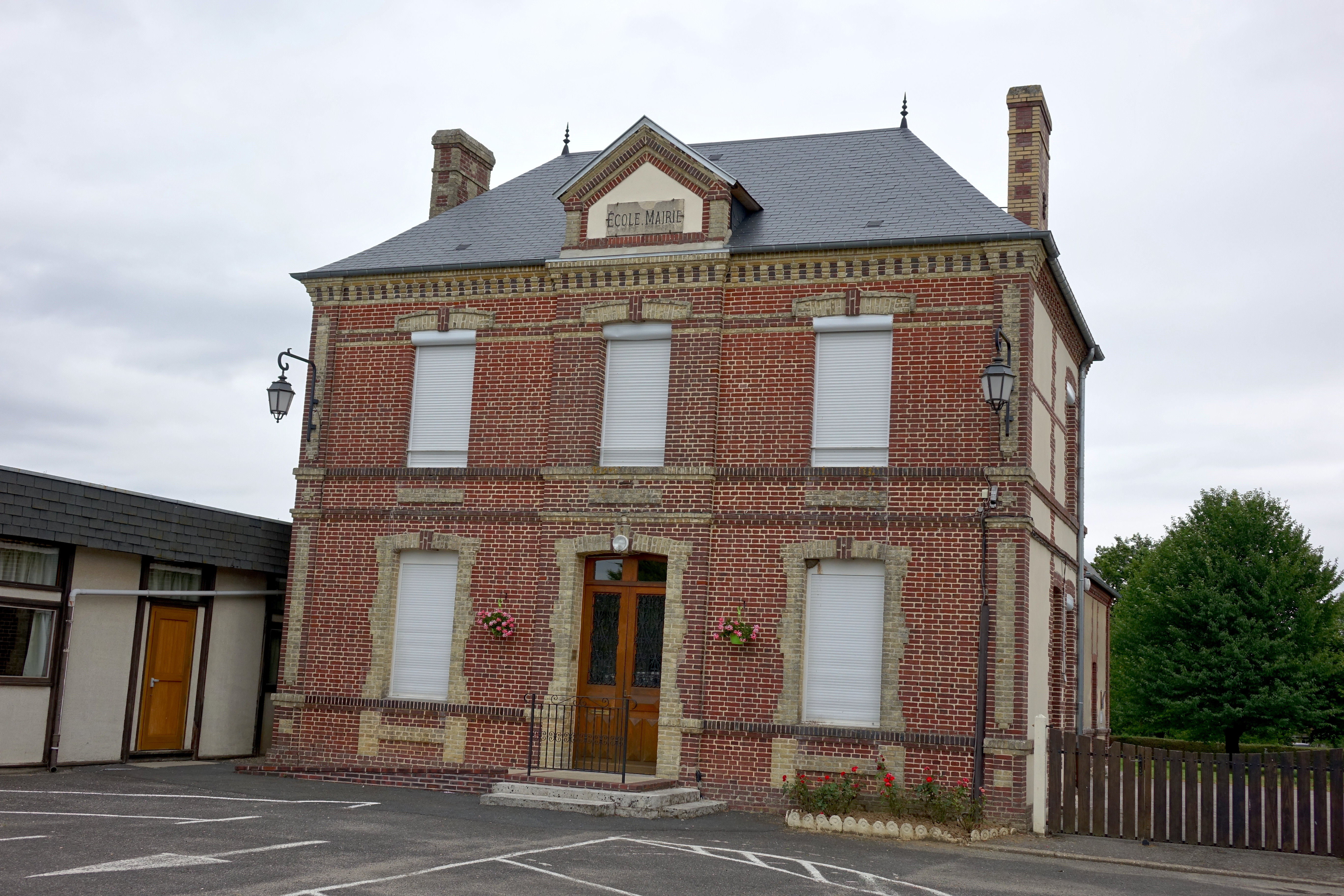 Mairie de La Haye-de-Calleville, Eure, France